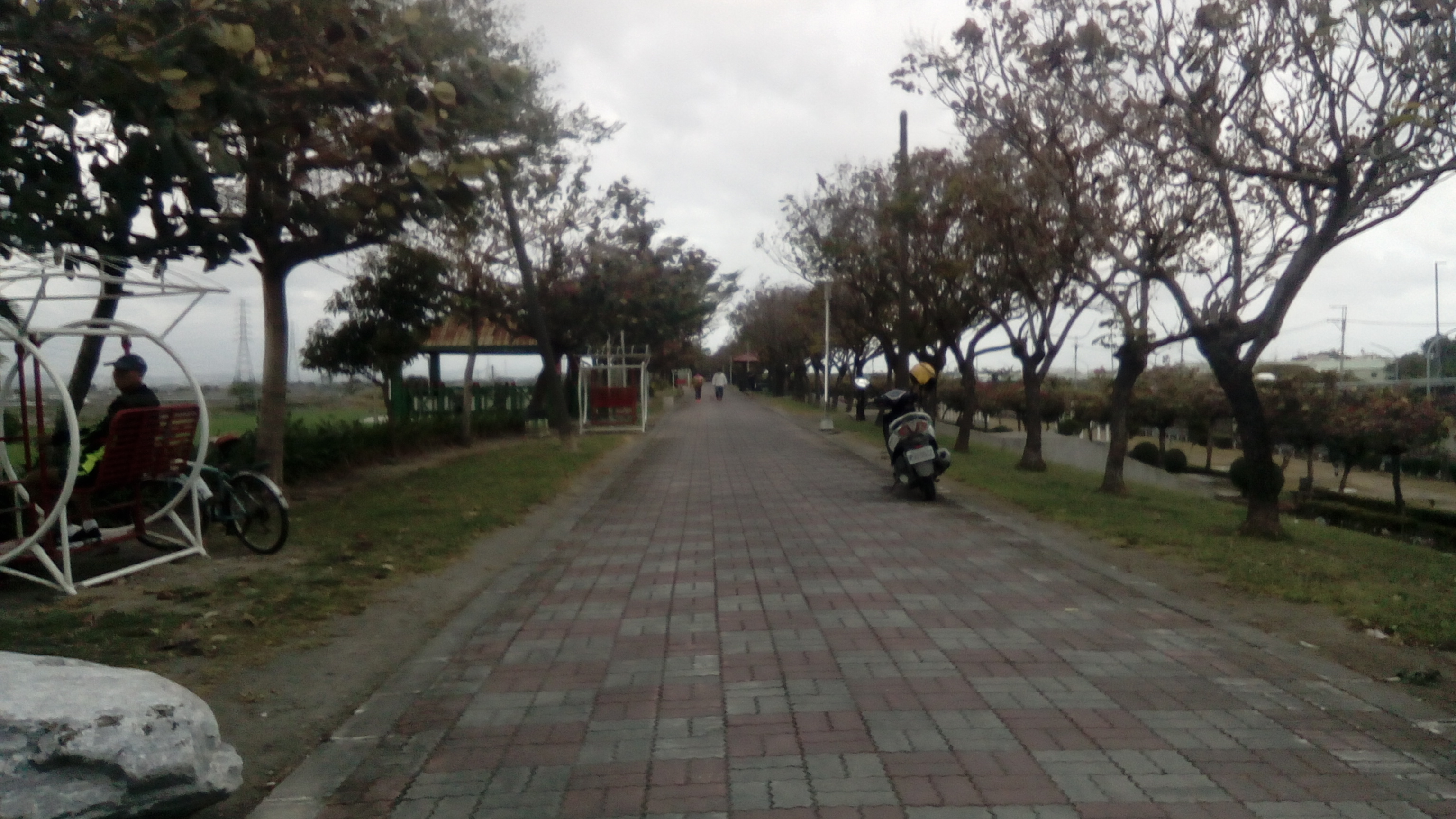 位於萬丹鄉西部，萬大橋下，鄰牛稠溪及高屏溪